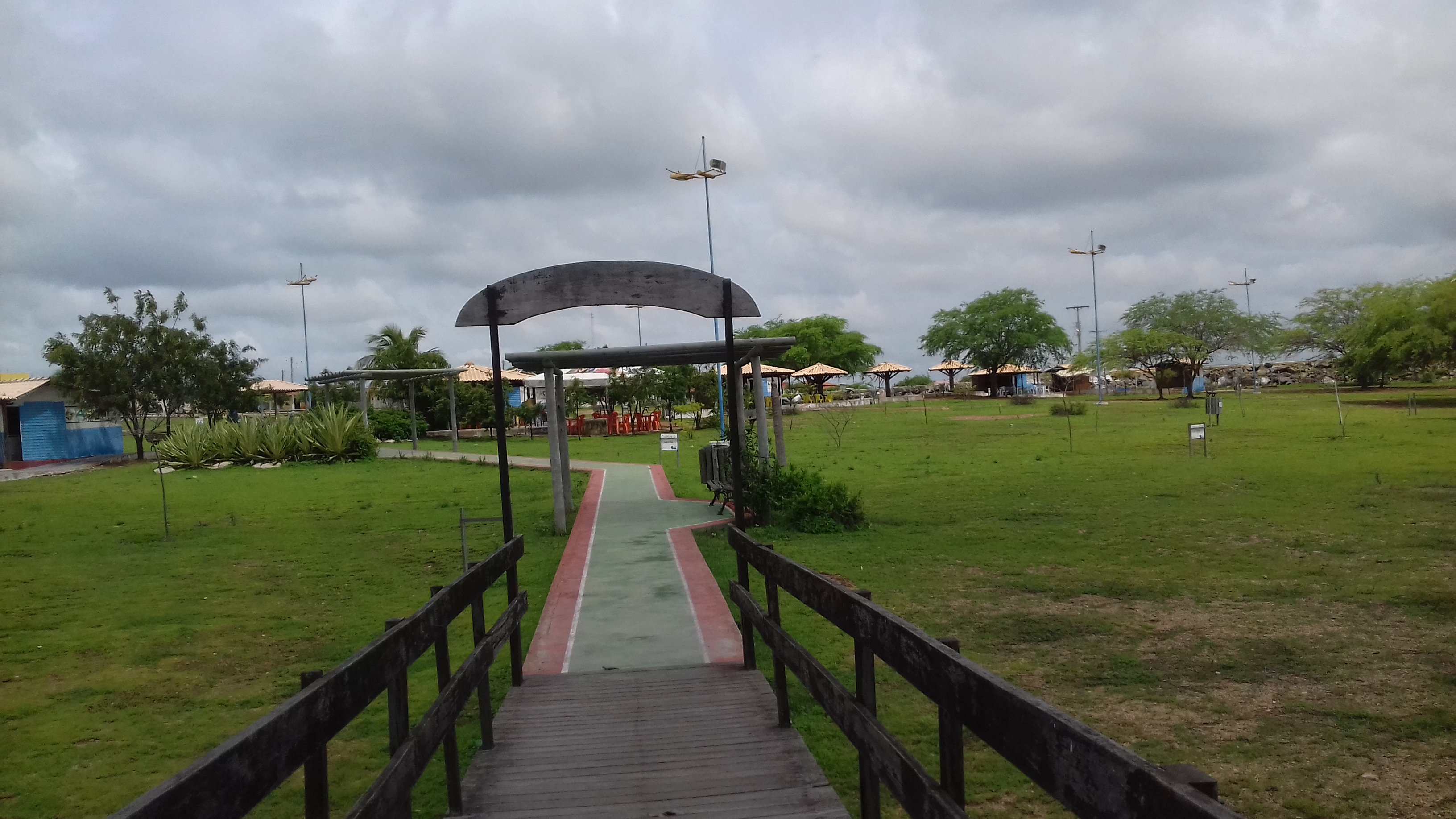 Povoado de Poço Grande, município de Araci, e seu complexo turístico